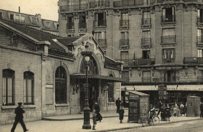 Gare de l'Avenue de Saint-Ouen (Paris 18e) - Petite Ceinture